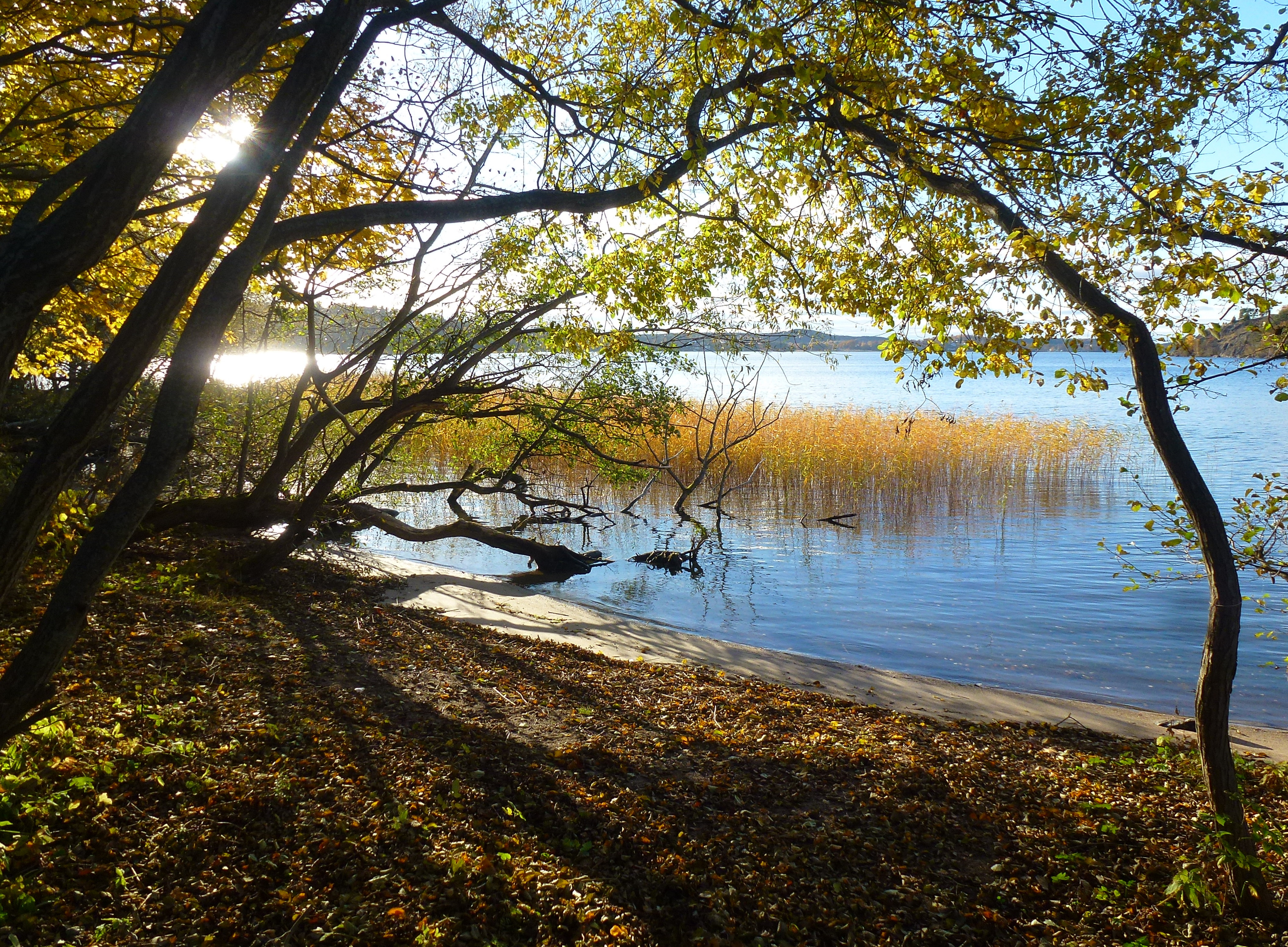 Blick på Mälaren från strandpromenaden i Sätraskogens naturreservat